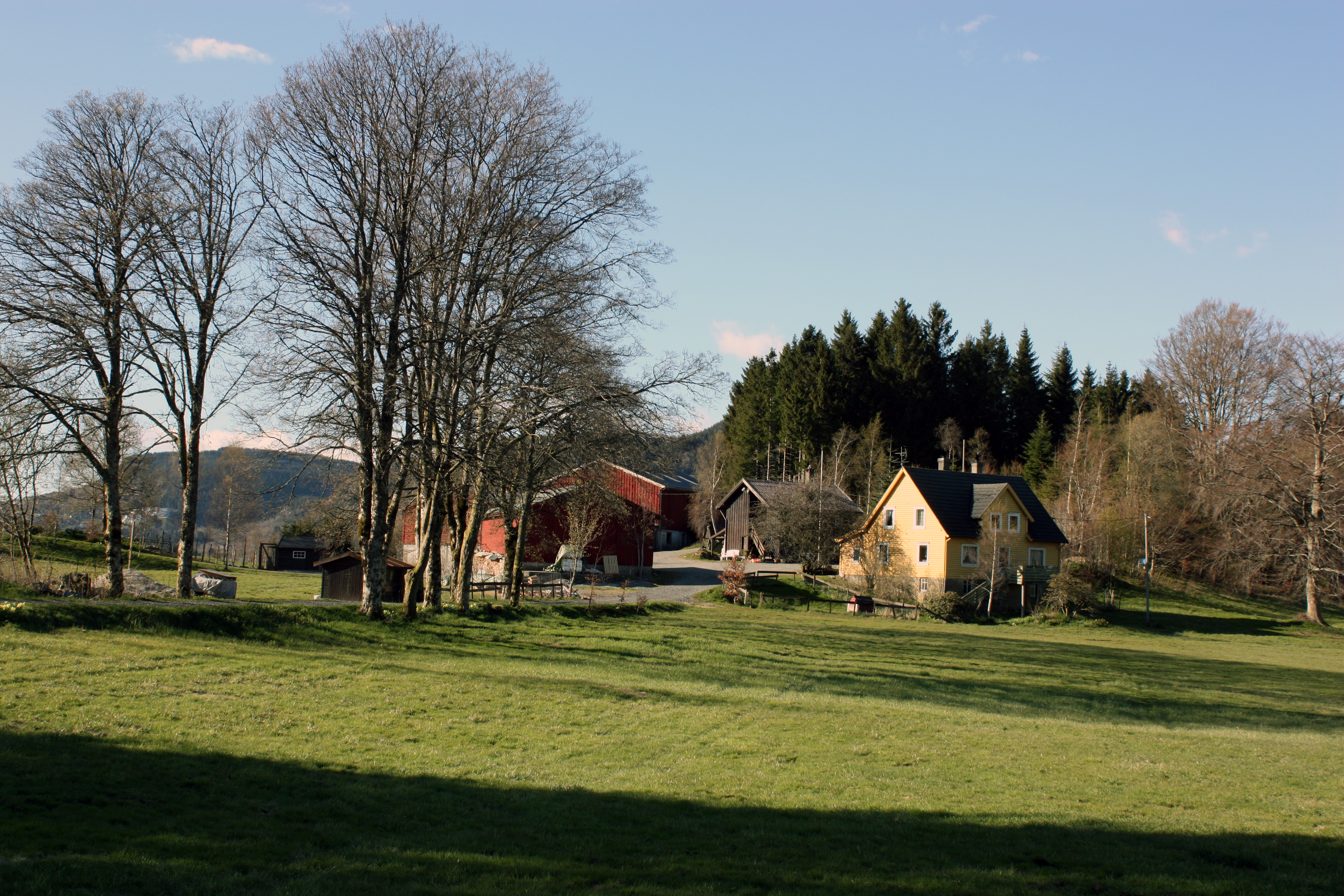 Kismul, Fana, Bergen.